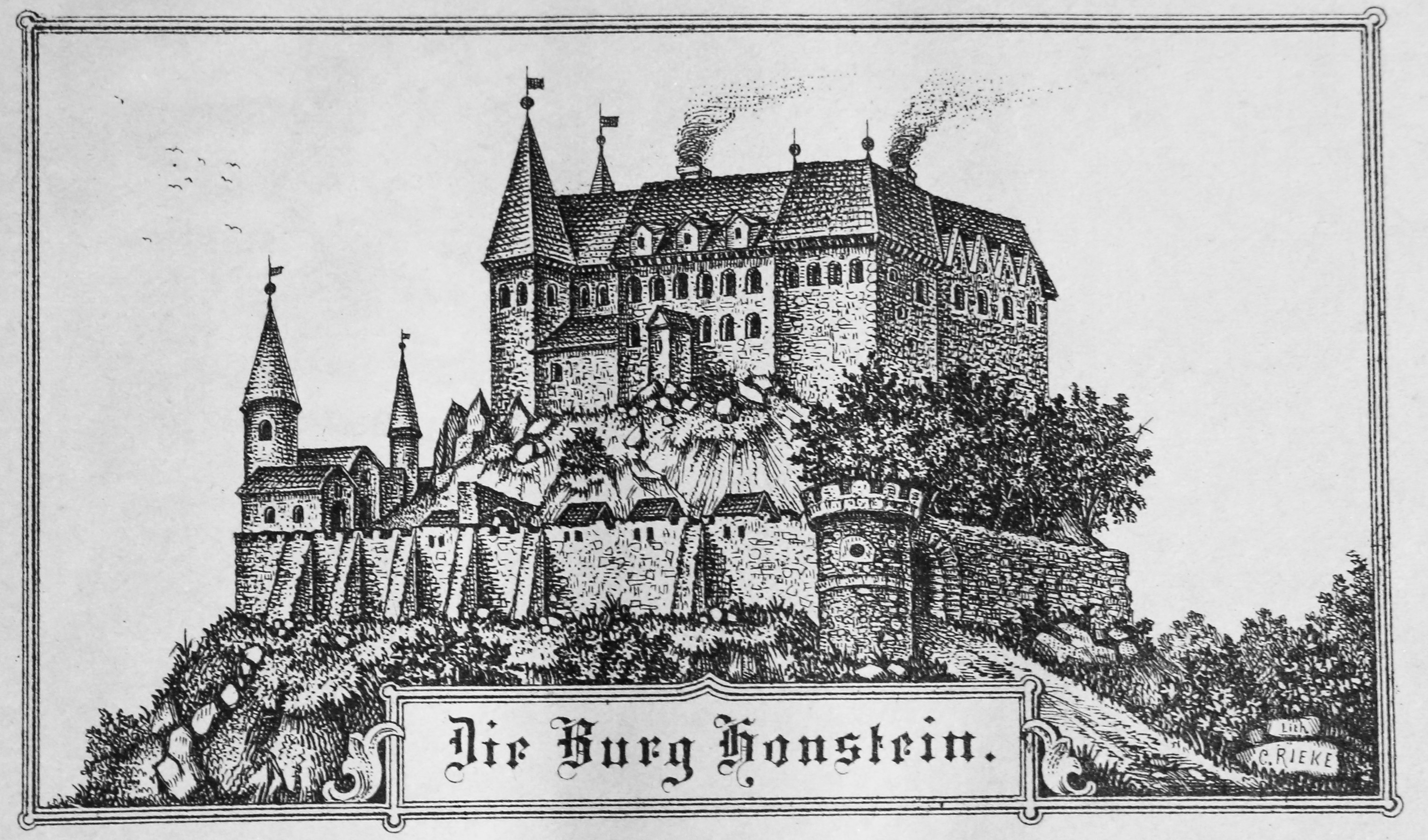 Die Burg Honstein (Zeichnung 1887)